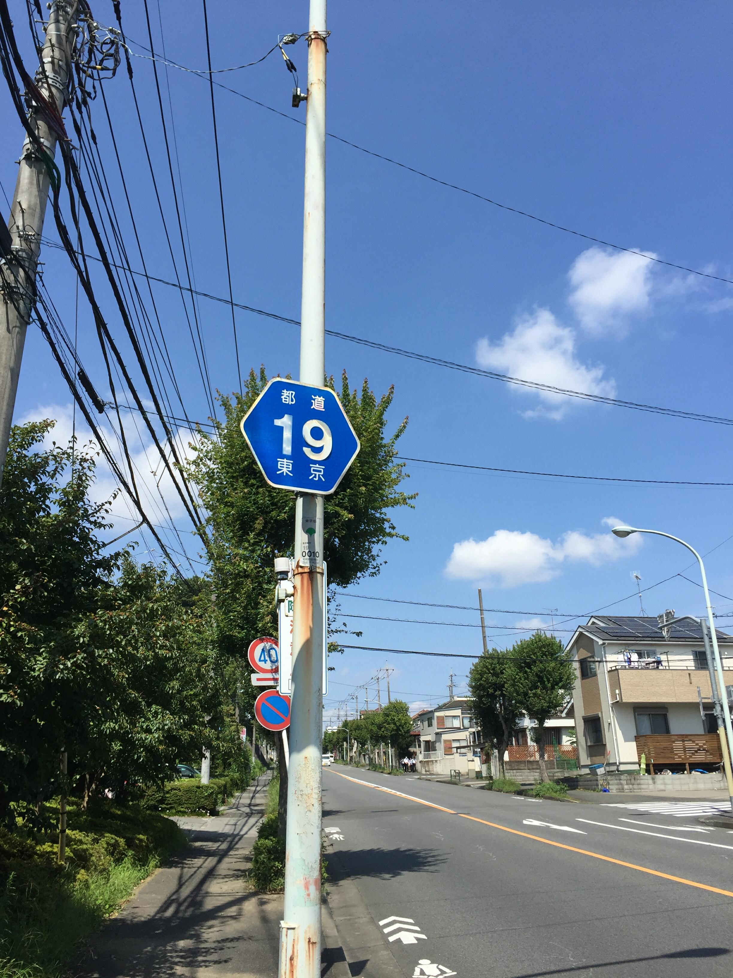 都道19号番号標示（町田市鶴川）